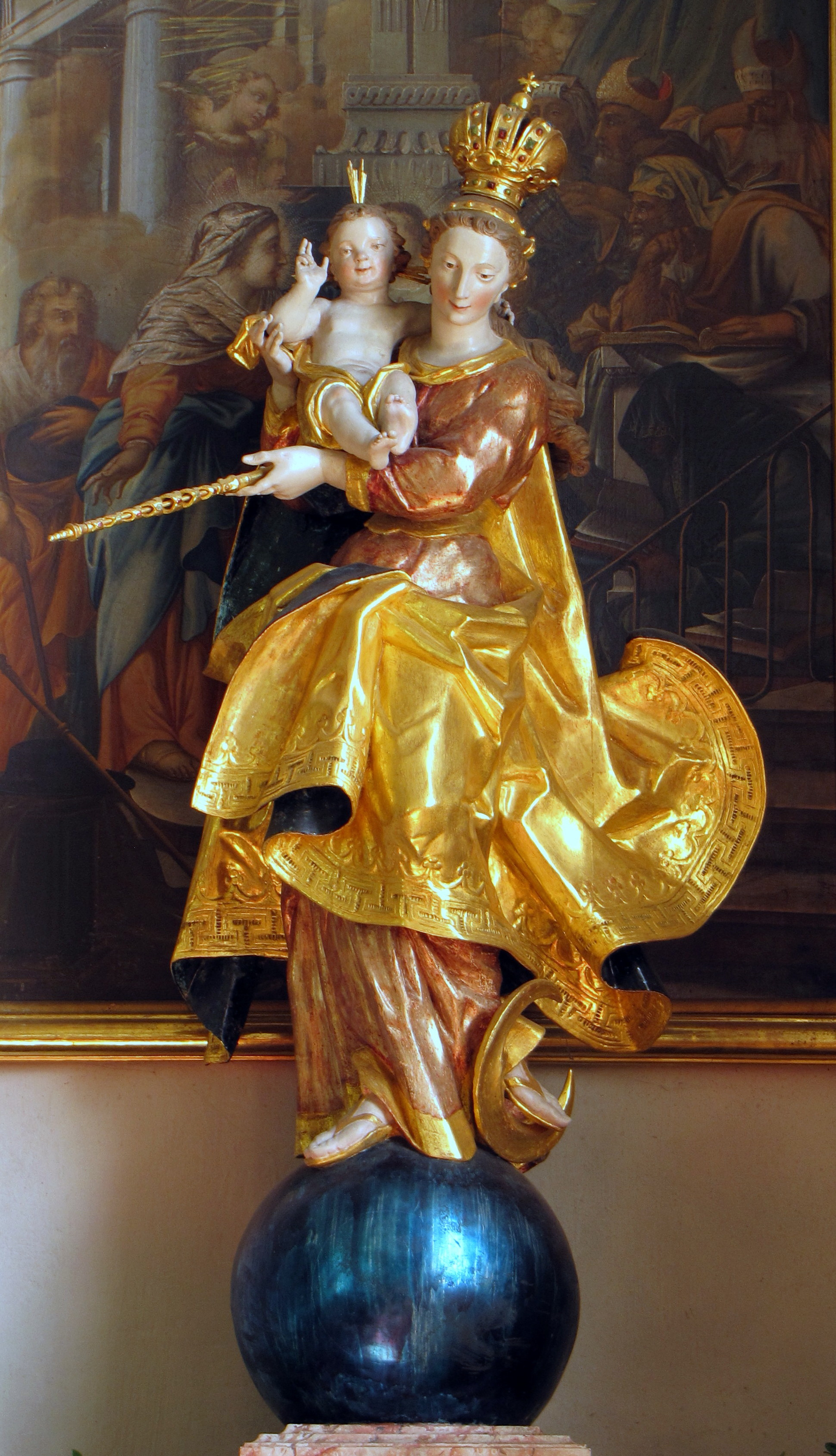 Madonna von Johann Richard Eberhard, 1784, am rechten Seitenalter der Kirche in Elmen